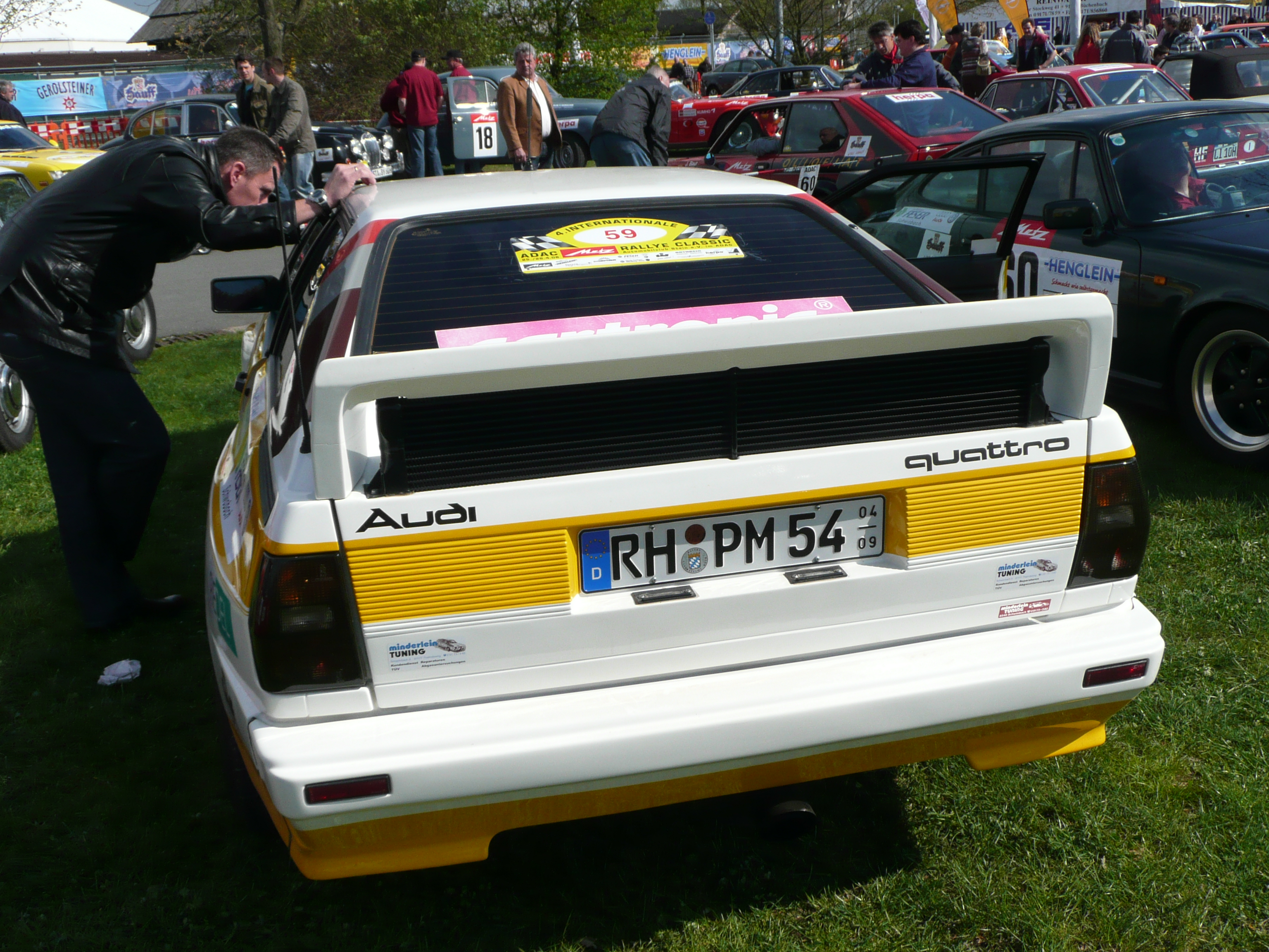 Audi Sport Quattro E2 bei der Metz Rallye 2008